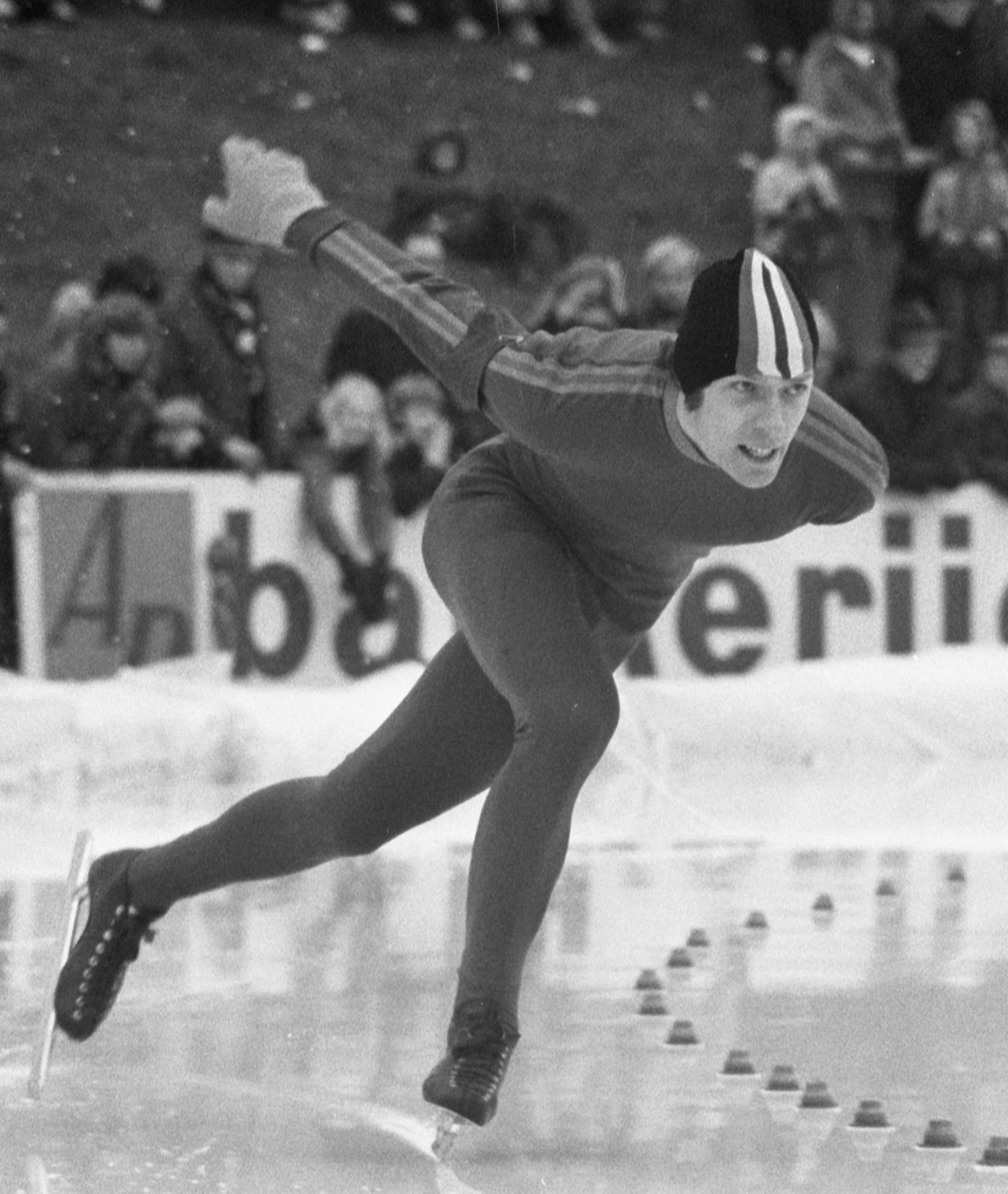 Nederlandse kampioenschappen schaatsen dames en heren amateurs te Assen. Eppie Bleeker in actie